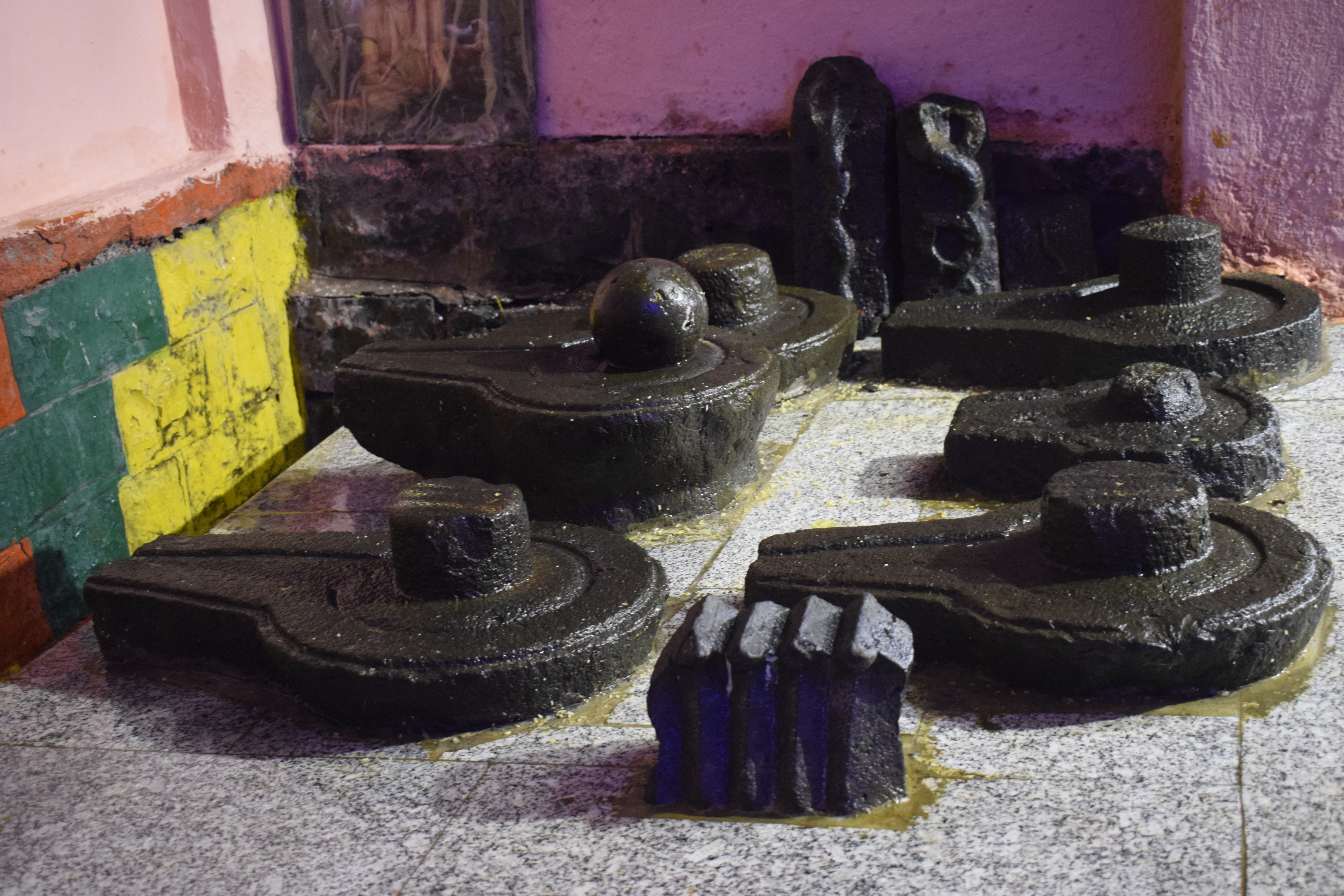 श्री त्रिपुरेश्वर लिंग